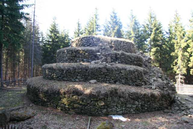 Pyramide im Waldviertel